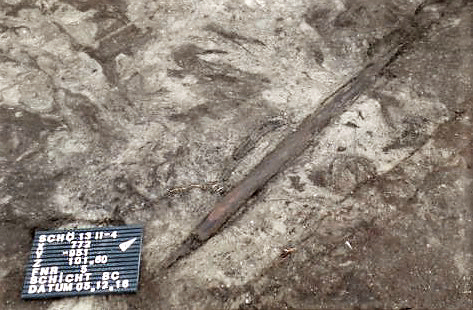 Archäologische Ausgrabung im Tagebau Schöningen, Wurfstock aus der Fundstelle Schöningen 13 II-4, Obere Berme.